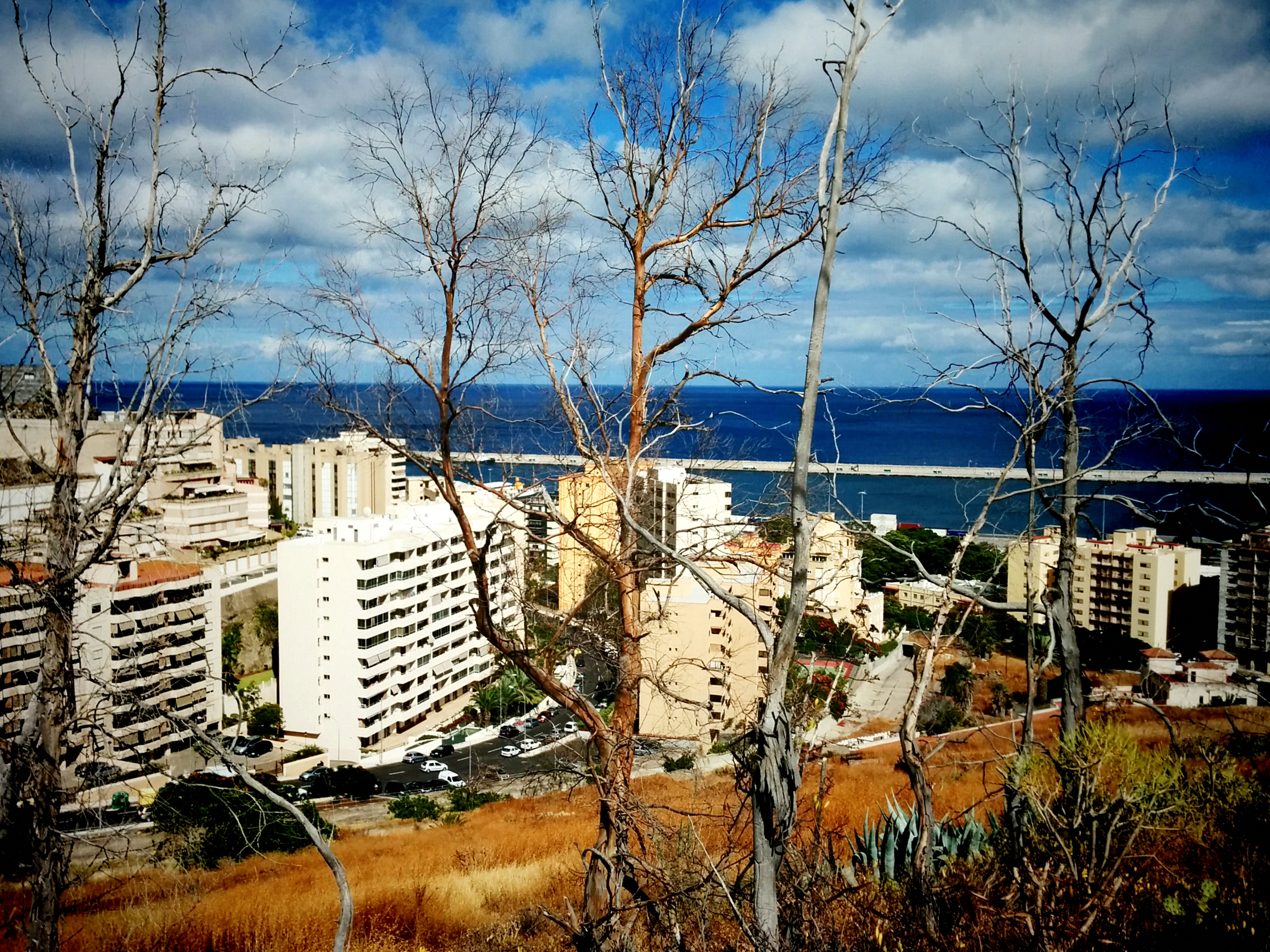 Vista de Urbanización Anaga desde la montaña Fumero